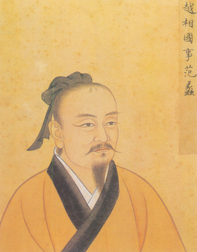 Fanli